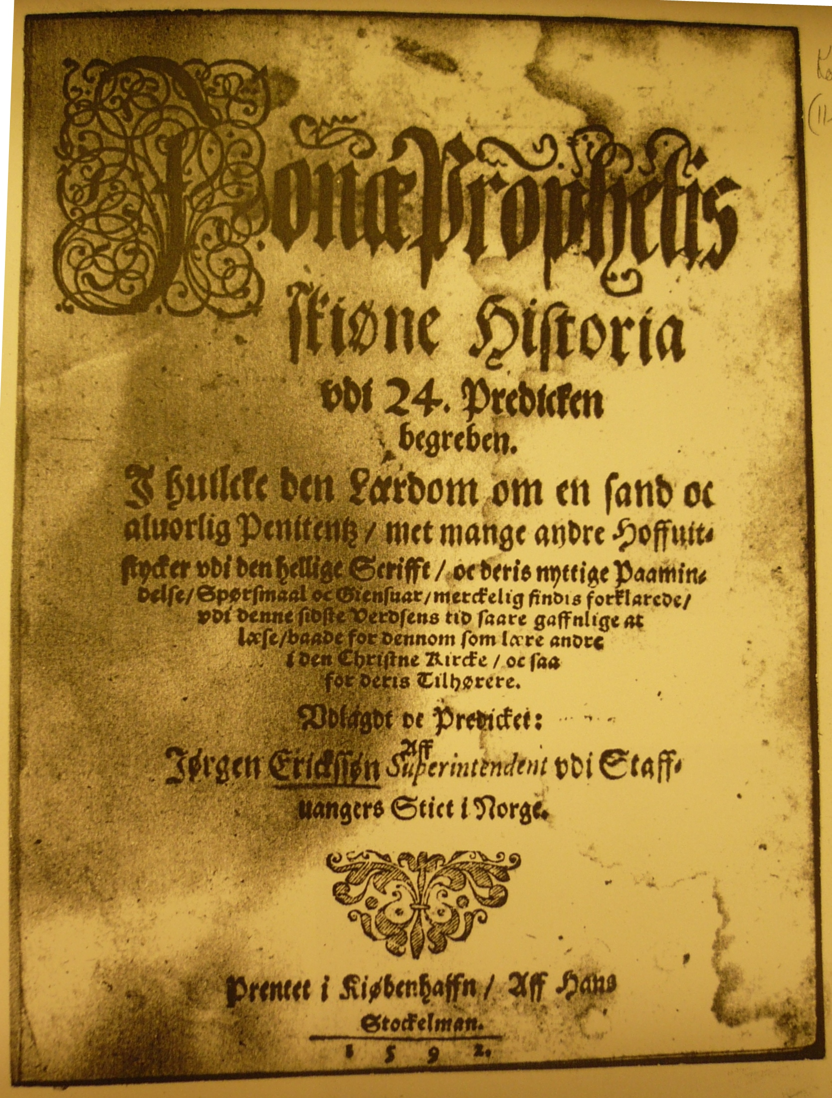 Framsiden av biskop Jørgens Erikssons bok med 24 prekener om profeten Jonas fra 1592.